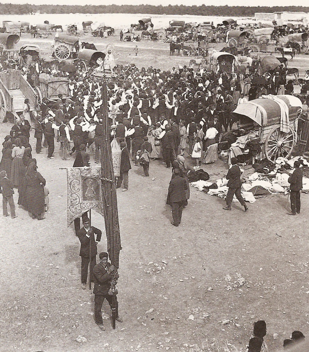 Romería de Nuestra Señora de El Henar (Cuéllar) a principios del siglo XX.